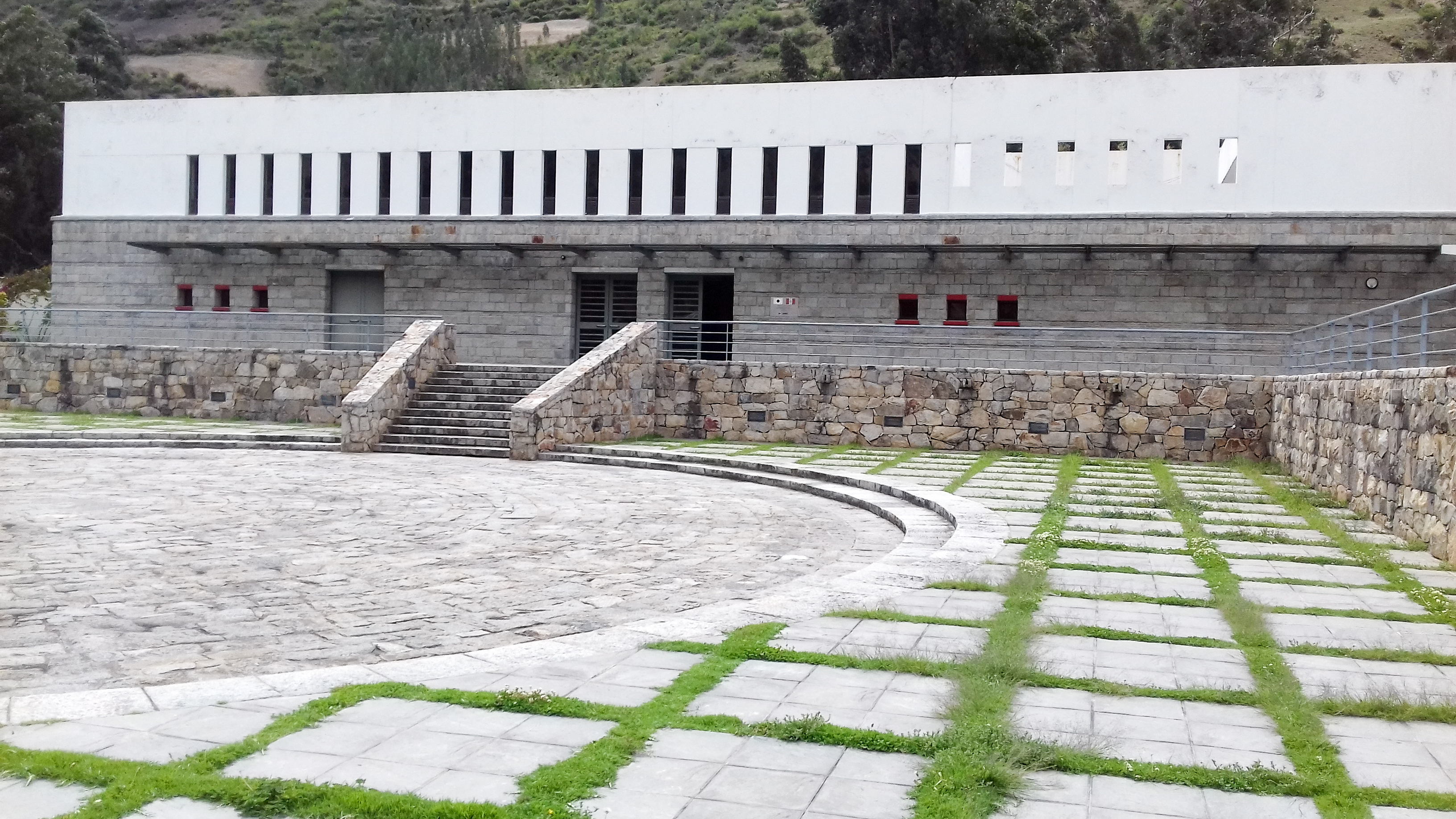 Petit mais intéressant musée régional de Chavin de Huantar.